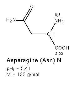 Asparagine - formule semi-développée Mars 2005 création personnelle